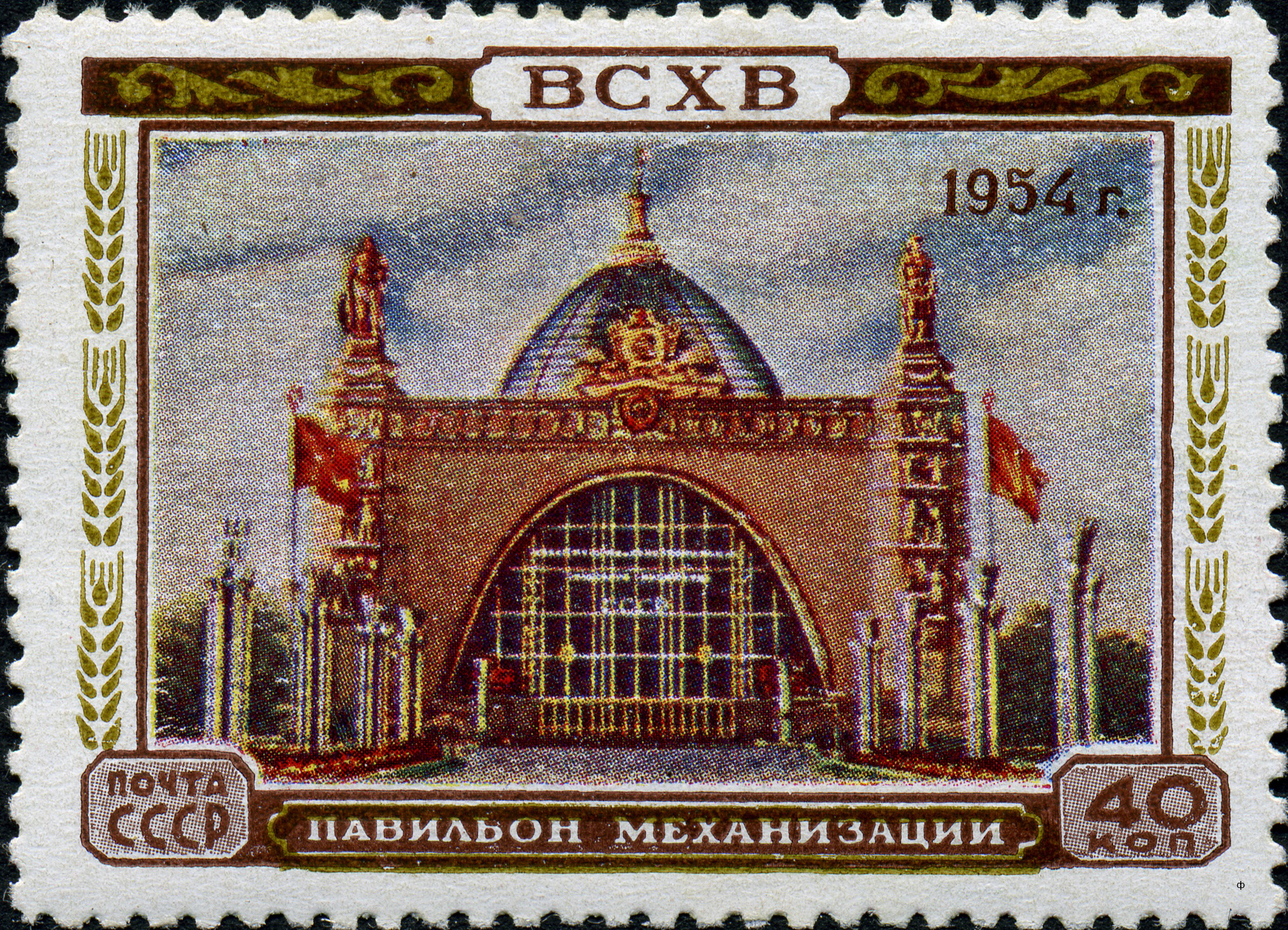 Марка СССР